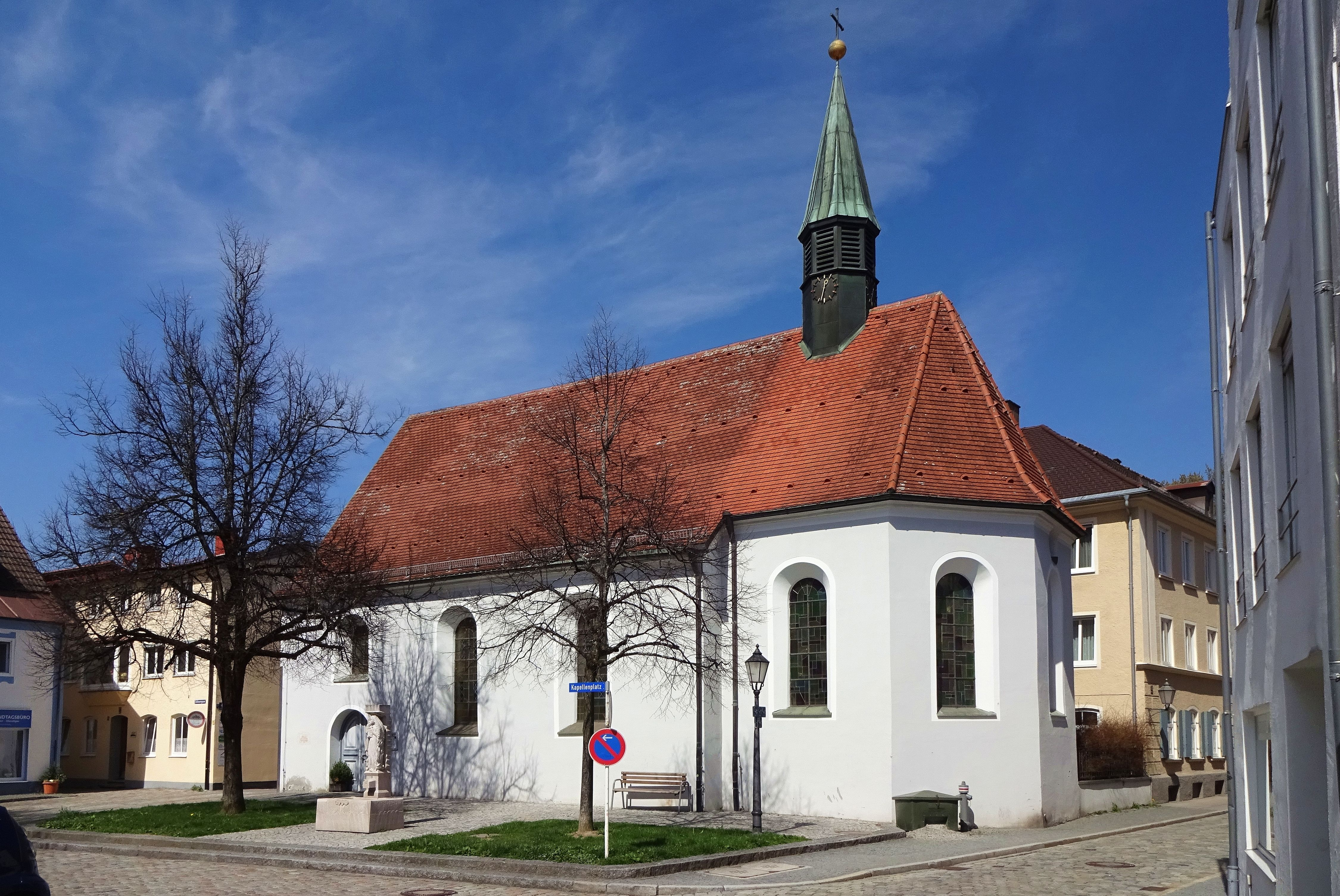 Die Seelenkapelle Kempten im April 2016